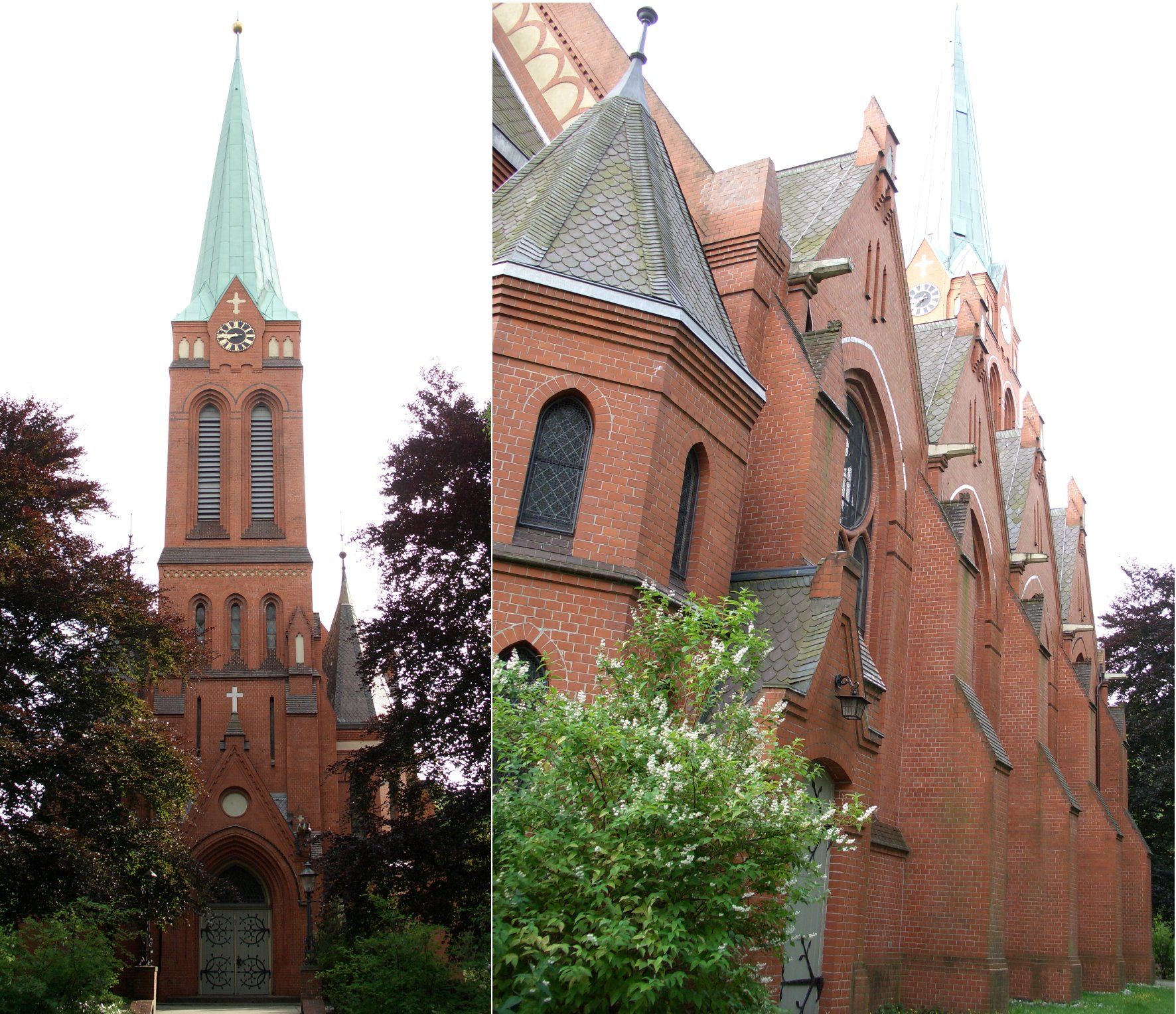 Außenansicht der Erlöserkirche in Hamburg-Lohbrügge